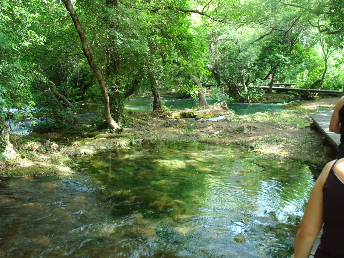 Parc national du Krka, sentier de promenade dans la nature du Skrabinski Buk